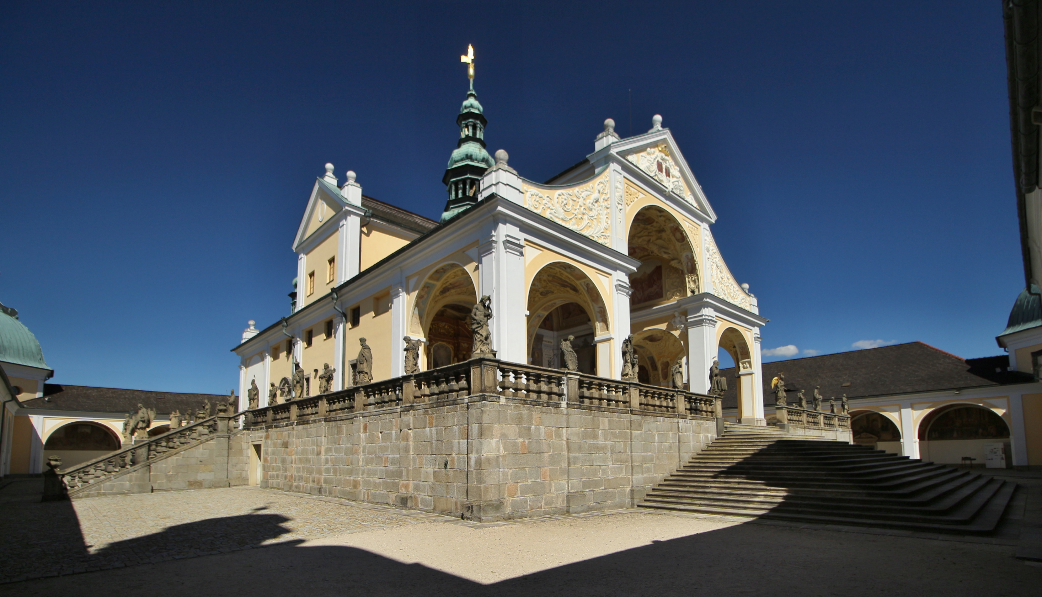 Svatá Hora (Příbram)